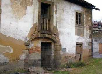 Casa de Sorribas en el concejo de Noreña.